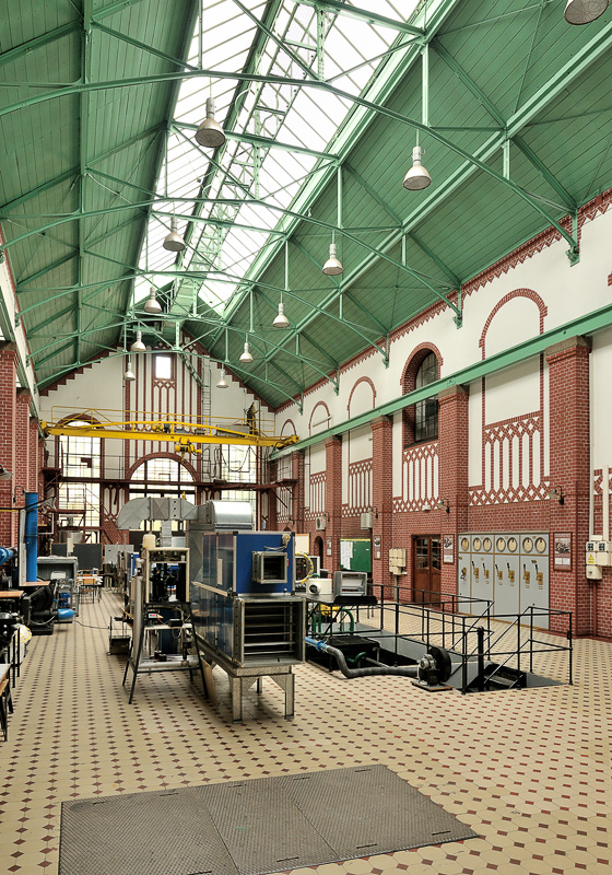 Wydział mechaniczny PG.